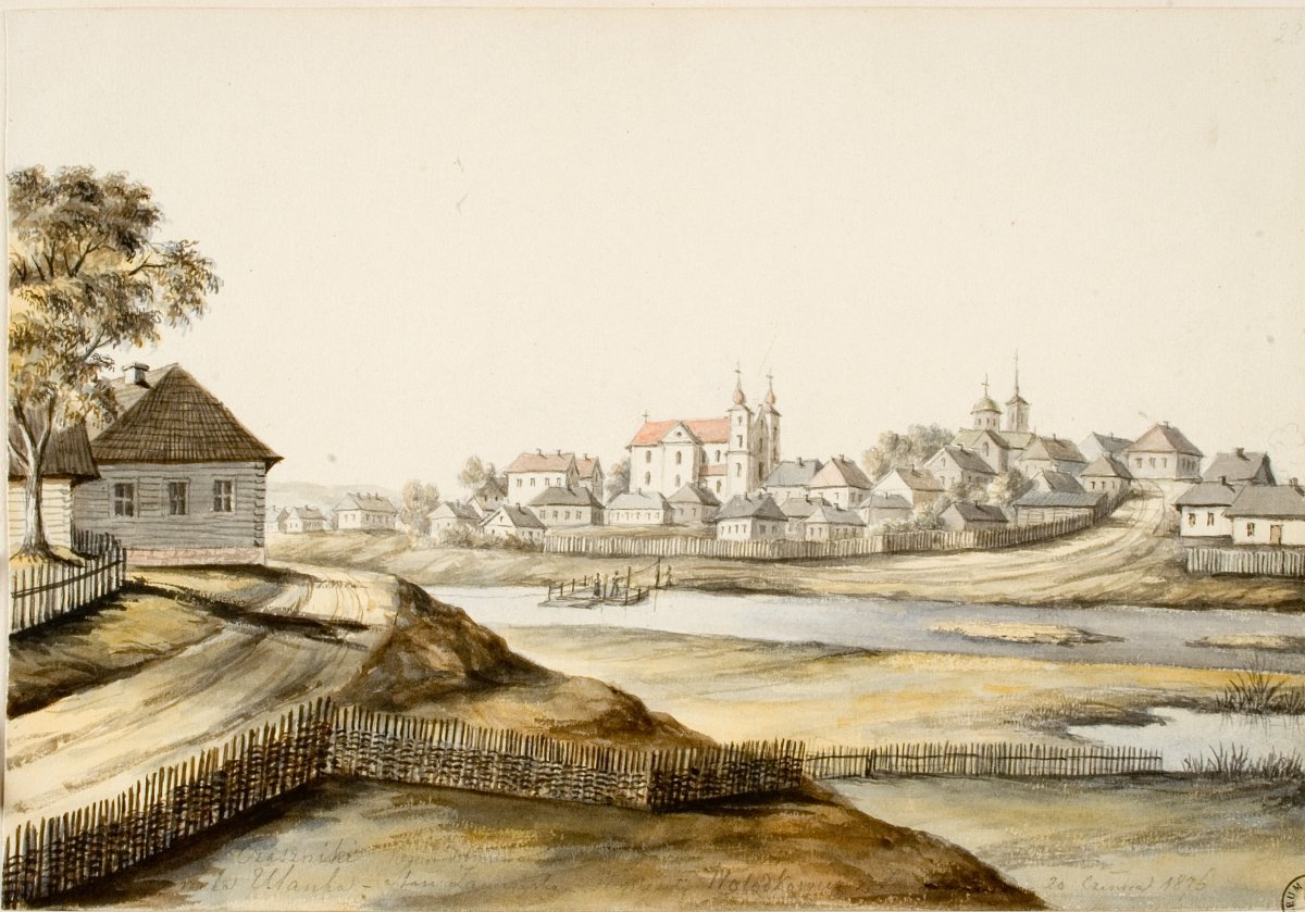 Беларуская (тарашкевіца): Чашнікі (Čašniki)